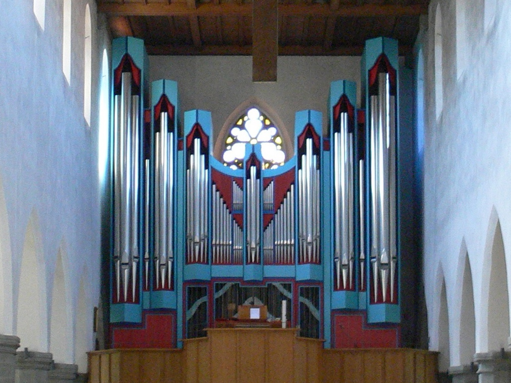 Pfarrkirche St. Jodok, Ravensburg Blick vom Chor zur Orgelempore mit Rieger-Orgel